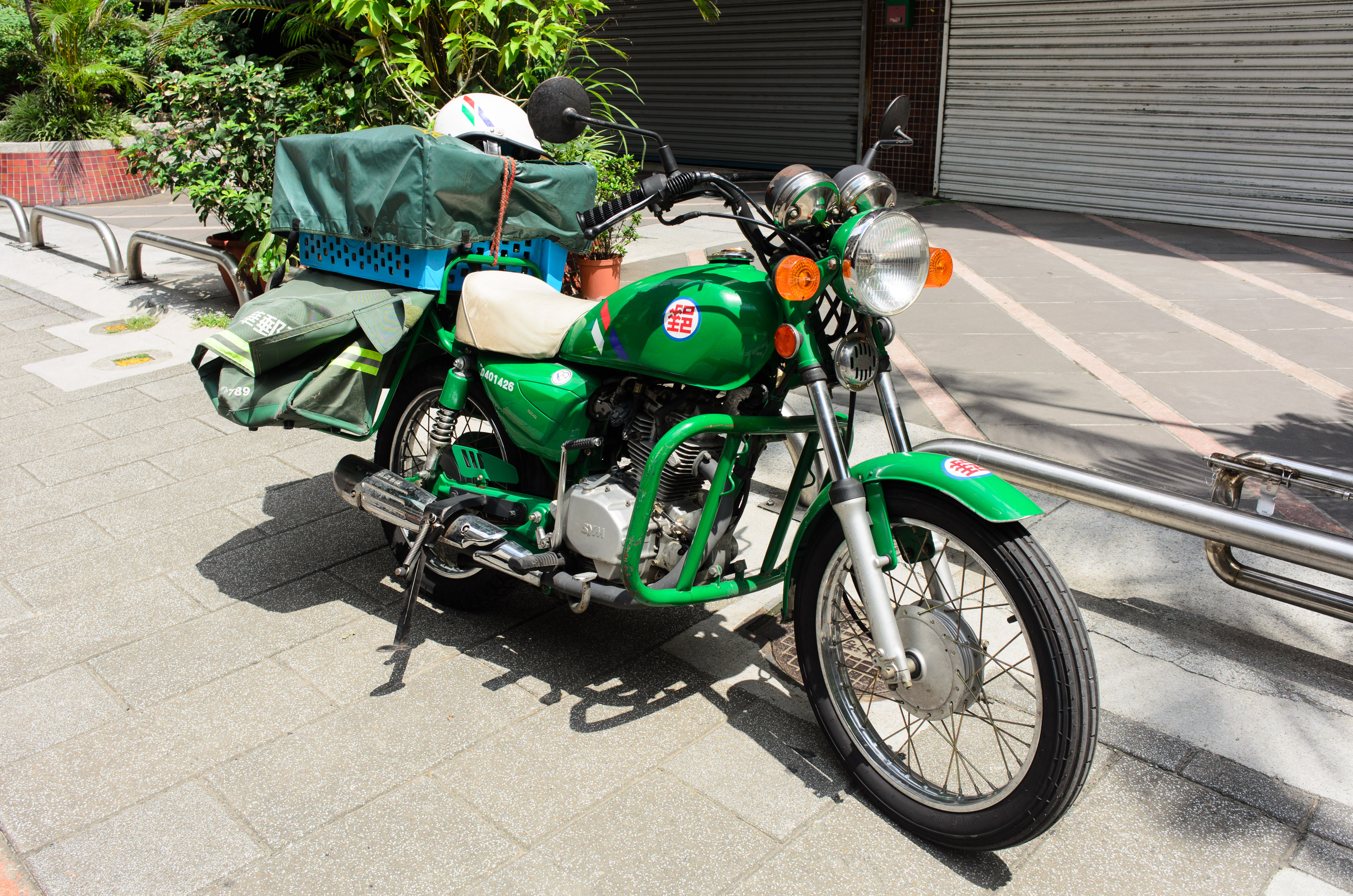 中華郵政三陽野狼125EFi郵務機車，攝於臺北市松山區三民路110巷。